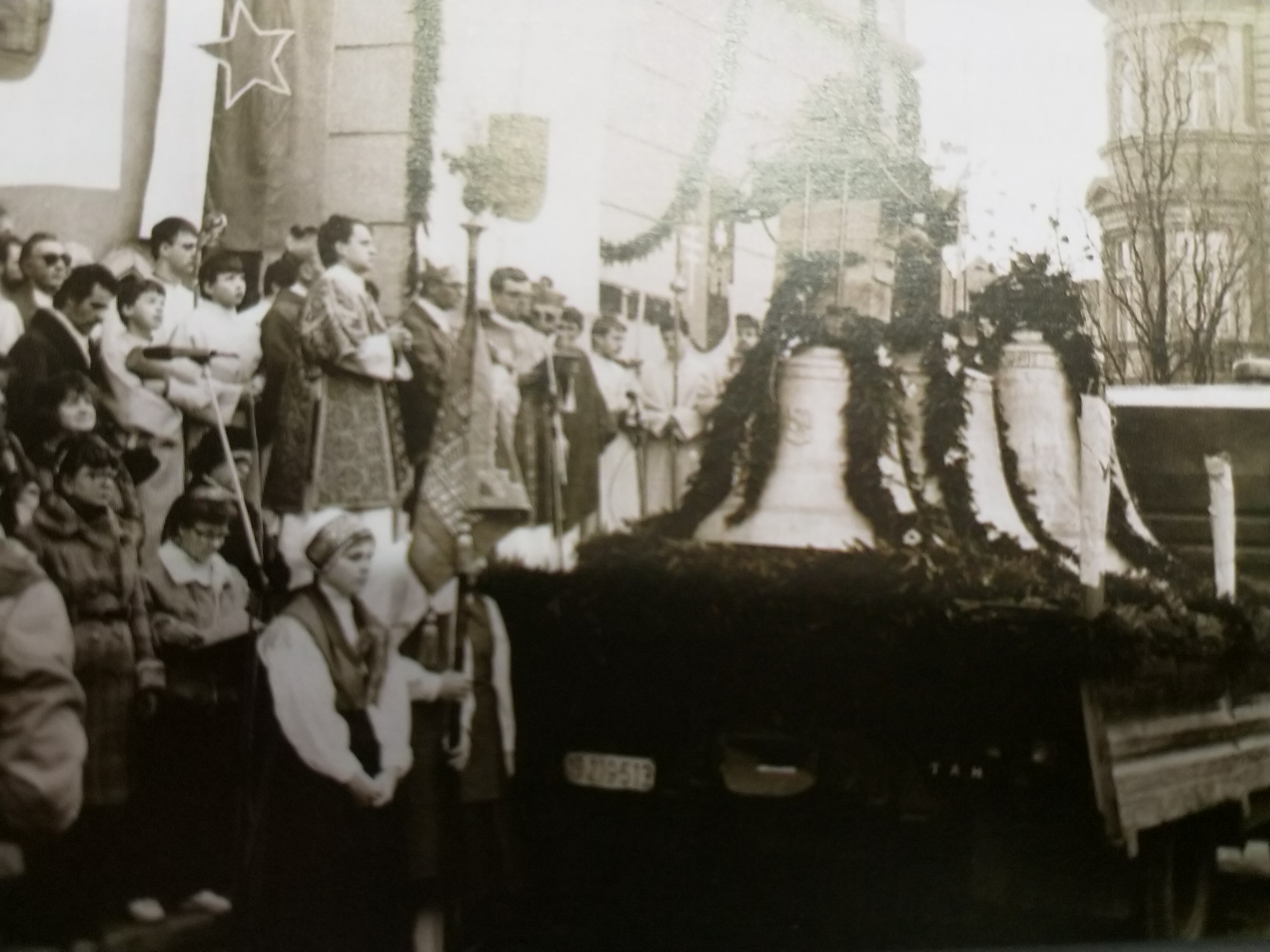 Dvig treh novih zvonov v stolnico